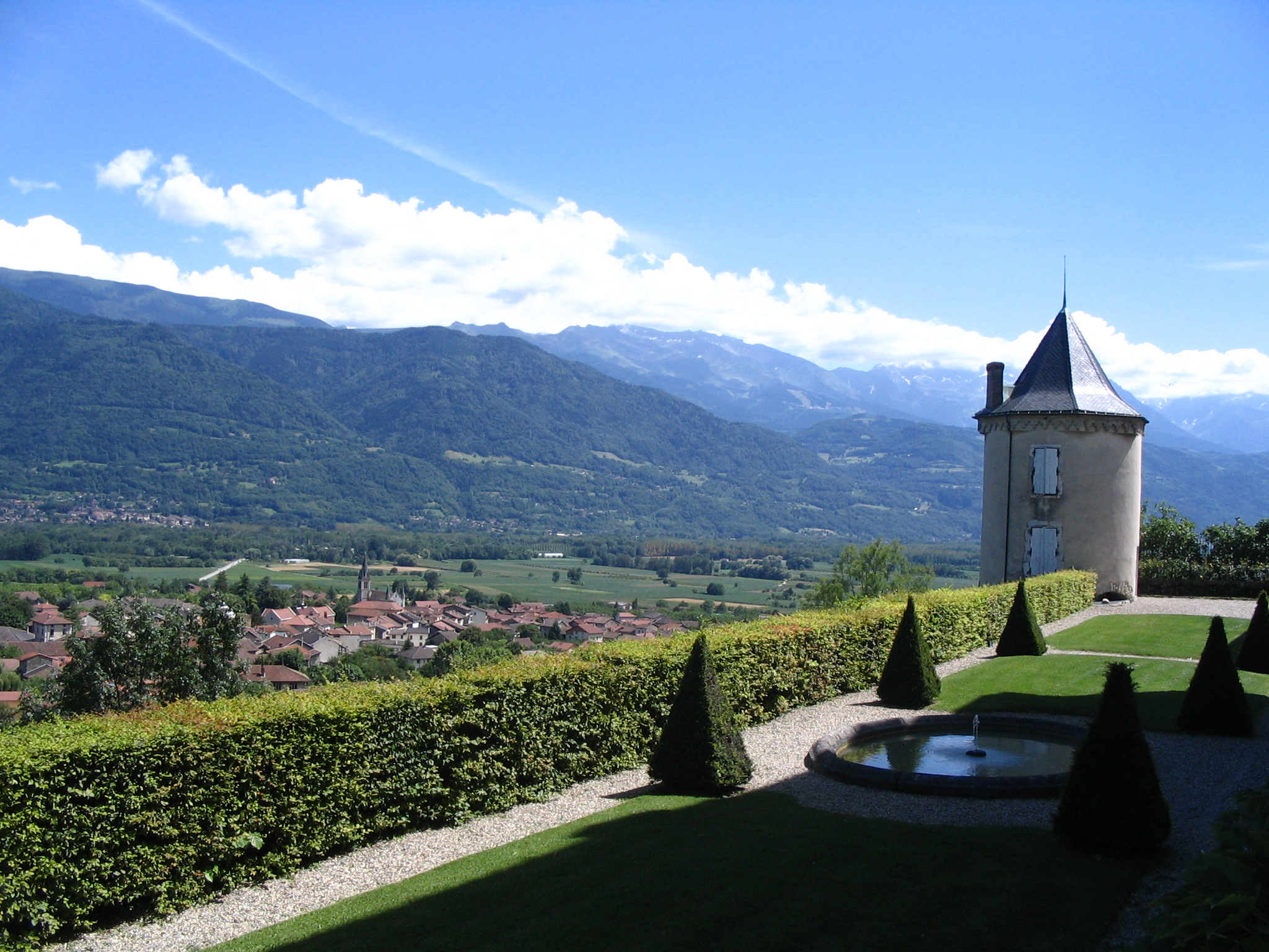 Le Touvet - vue depuis le chateau